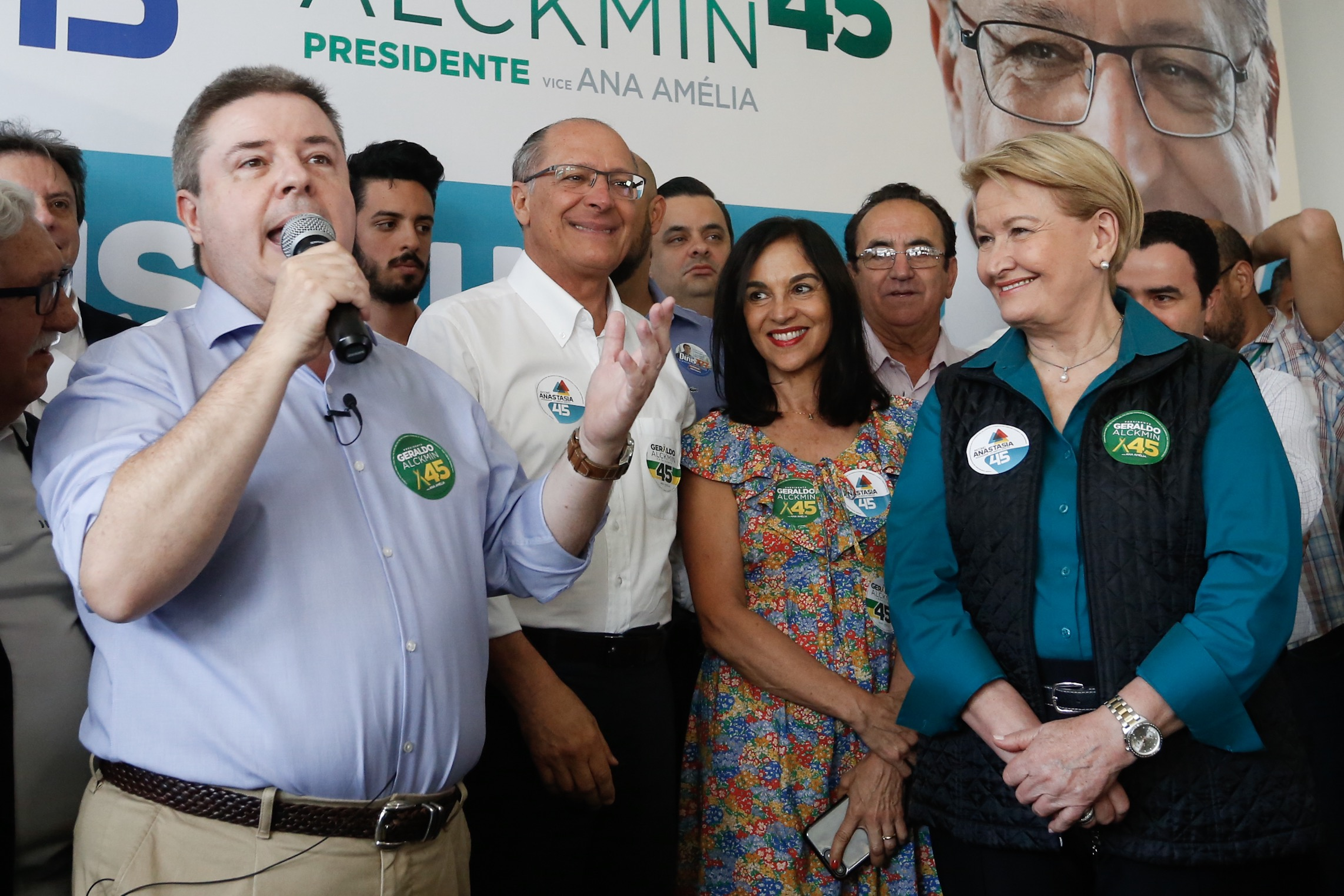 Antonio Anastasia, Geraldo Alckmin, Lu Alckmin e Ana Amélia Lemos em setembro de 2018.